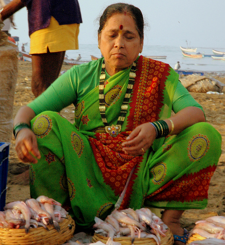 Koli Women Selling Fish